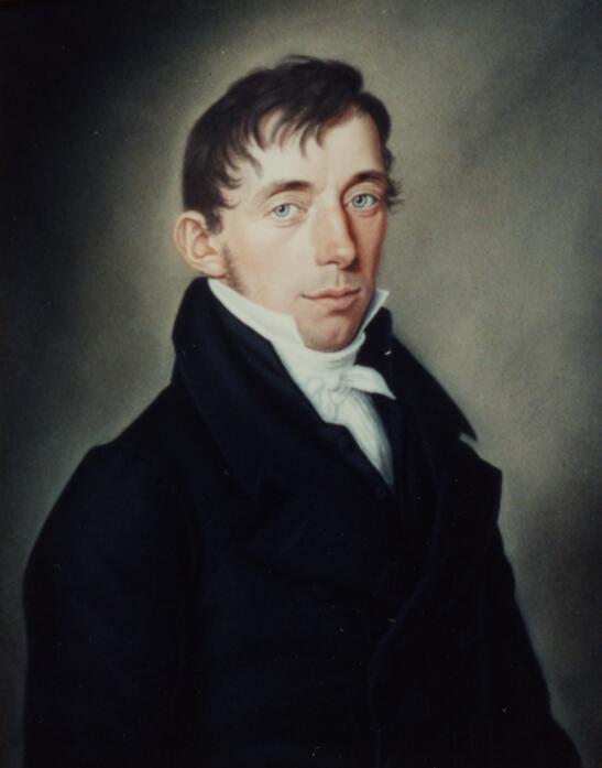 Portret van Aries Nanning Dijkhuizen (1773-1850), schout en burgemeester van Slochteren